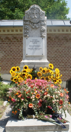 Christine Nöstlinger-Friedhof Hernals